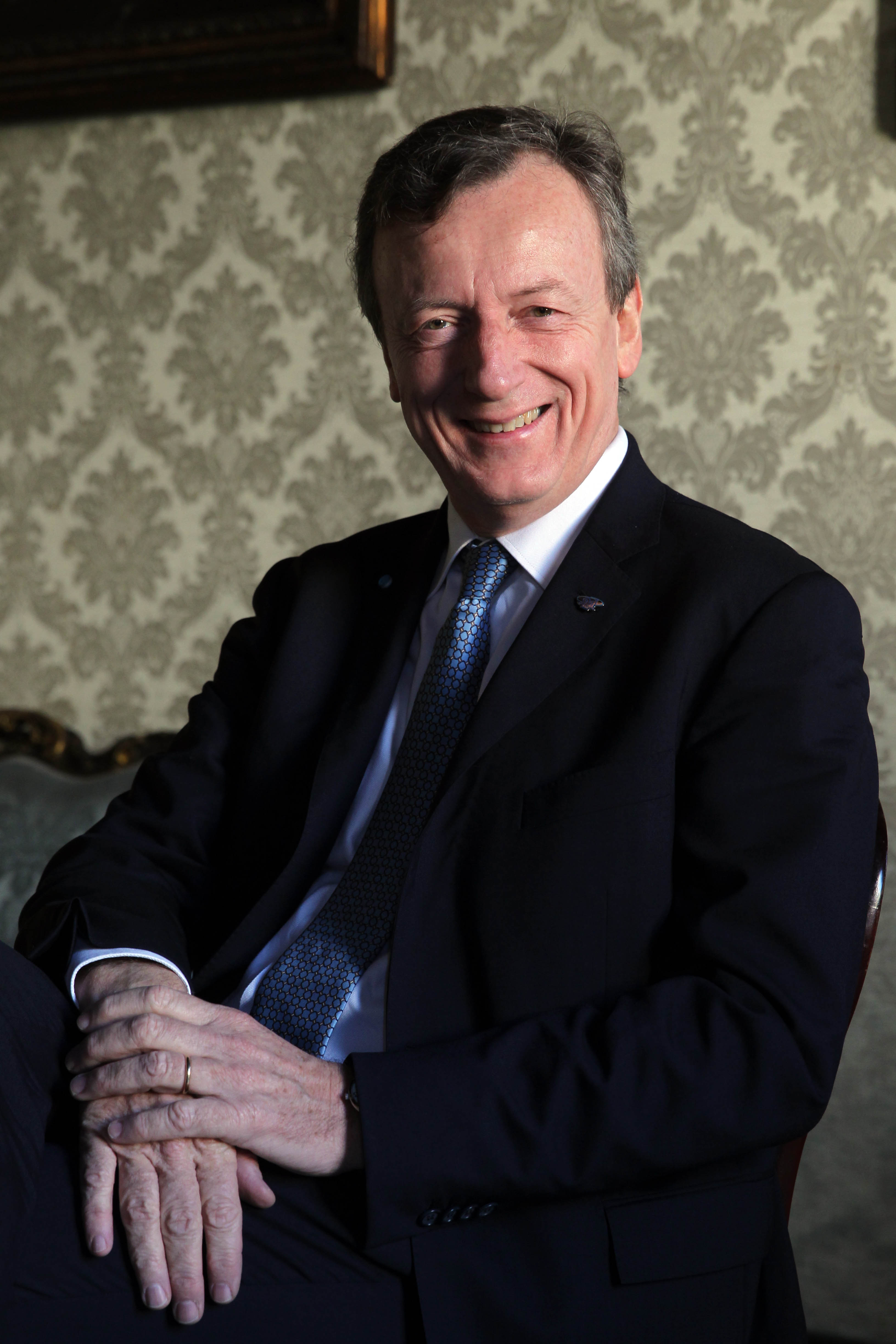 Foto del Presidente dell'ASI, Roma